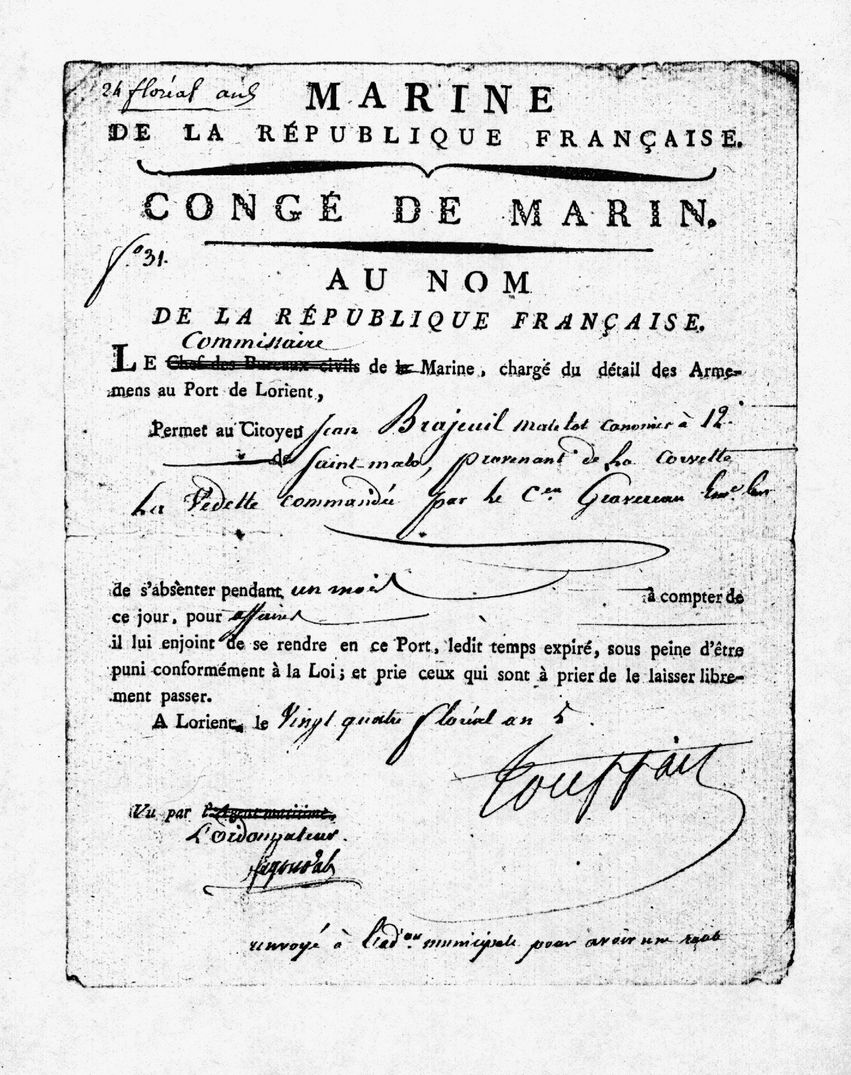 Congé de marin : autorisation de retour dans son foyer d'un canonnier de la corvette la Vedette donnée à Lorient en l'an 5. Hauteur : 20 cm.